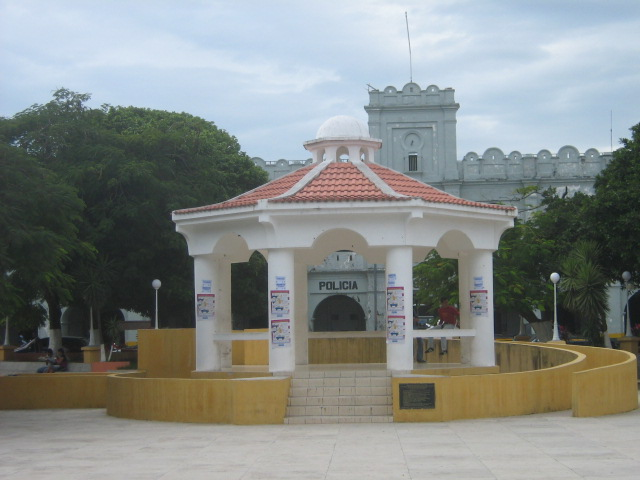 Kiosko que Jutiapa, situado en en el centro del Parque al frente del Palacio.